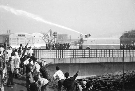 佐藤訪米阻止闘争（67年10月8日）の穴守橋での写真である。弁天橋の中核派、稲荷橋の革マル派を除く各派の学生や反戦青年委員会が穴守橋に集まった